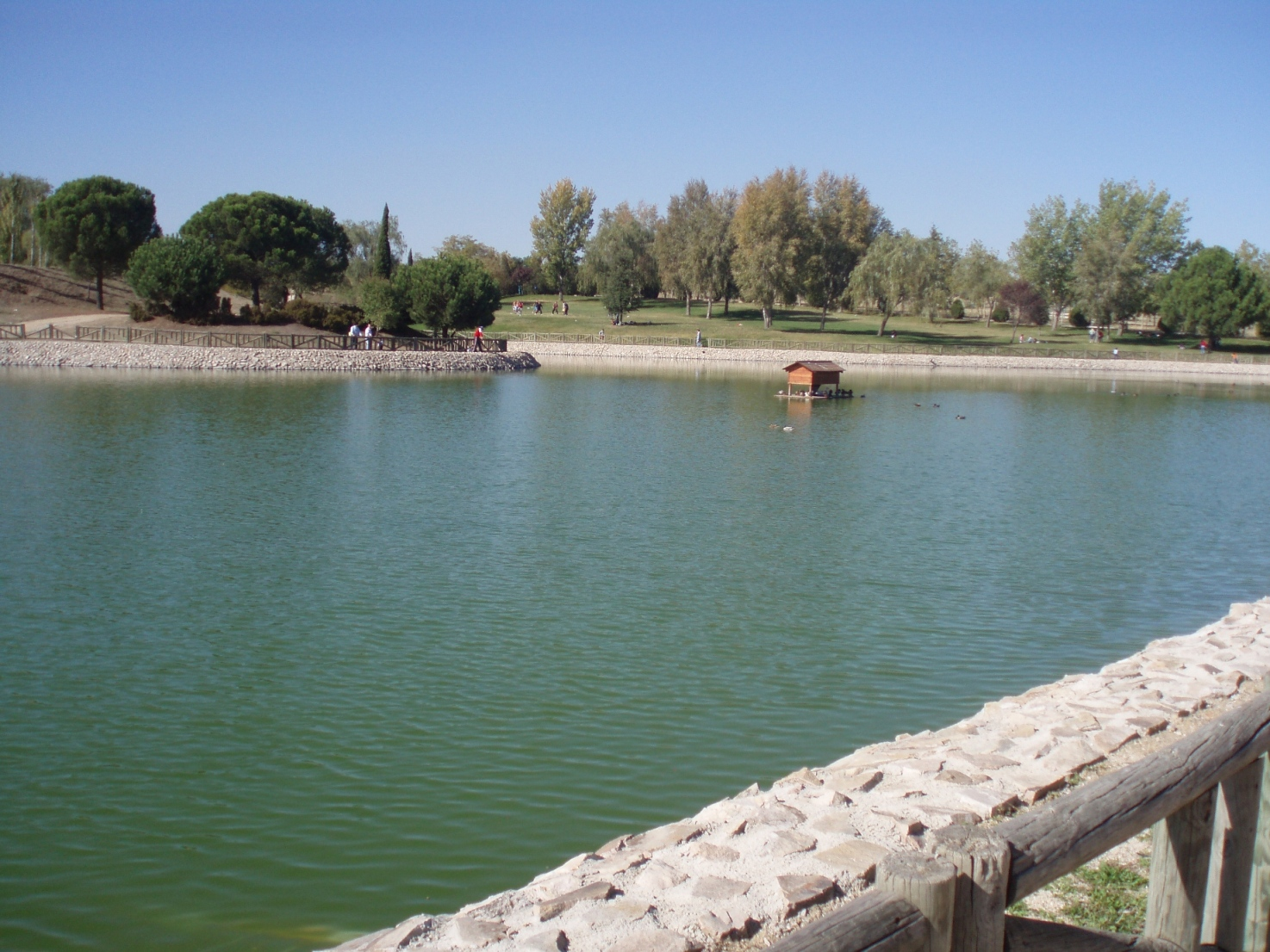 Lago del Parque del Sector 3 (Getafe, España).